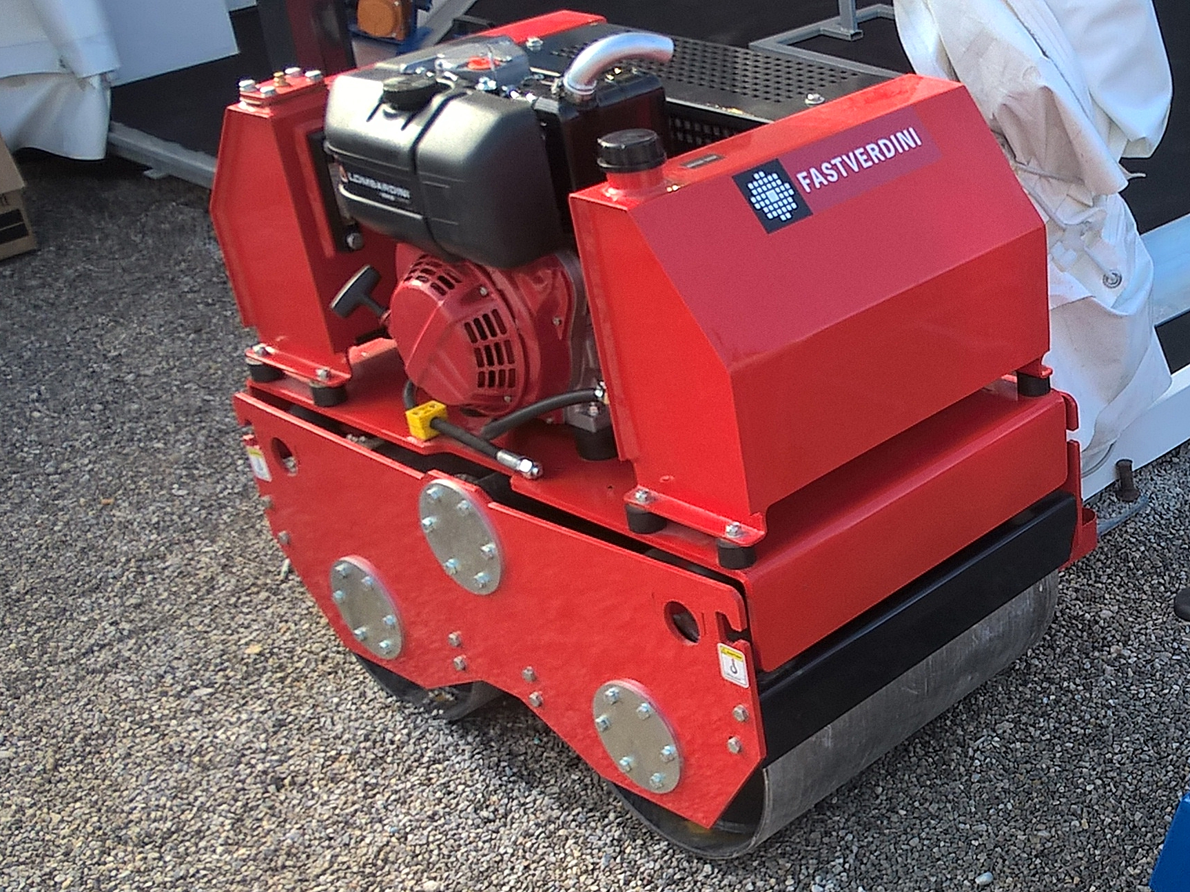 Gyalogkíséretű dupla hengeres vibrációs padkahenger. 600-700Kg körüli munkasúlyok, víztartállyal. Dízel, ill. benzin motoros erőforrással.